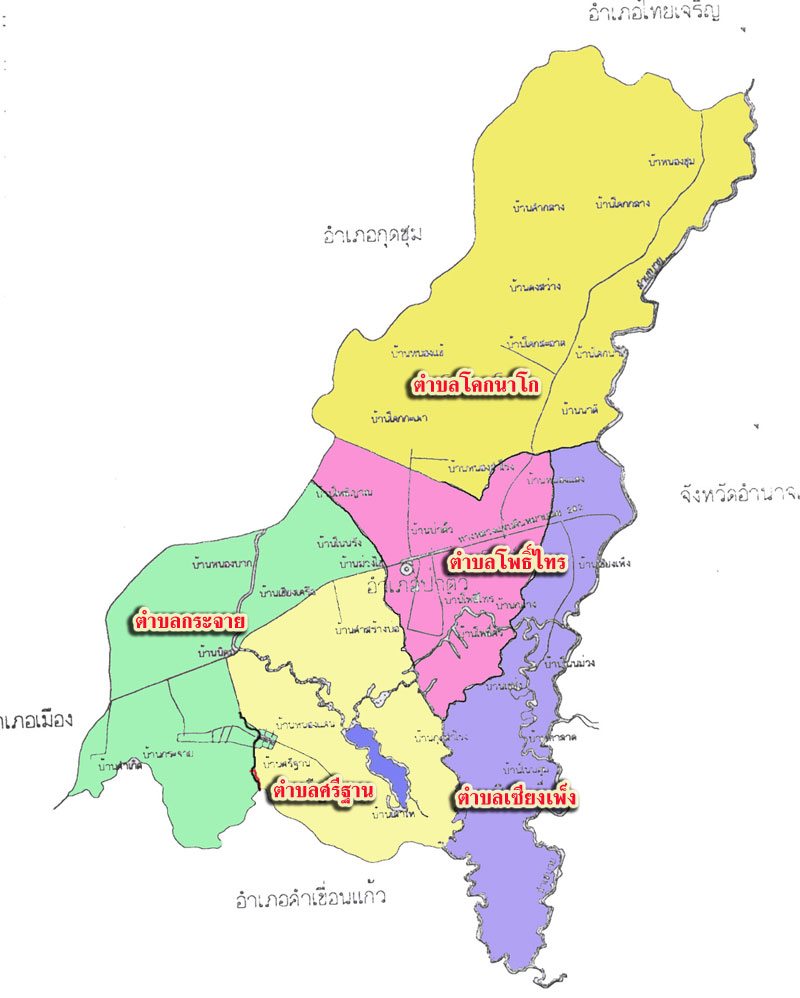 แผนที่อำเภอป่าติ้ว-สำนักงานพัฒนาชุมชน